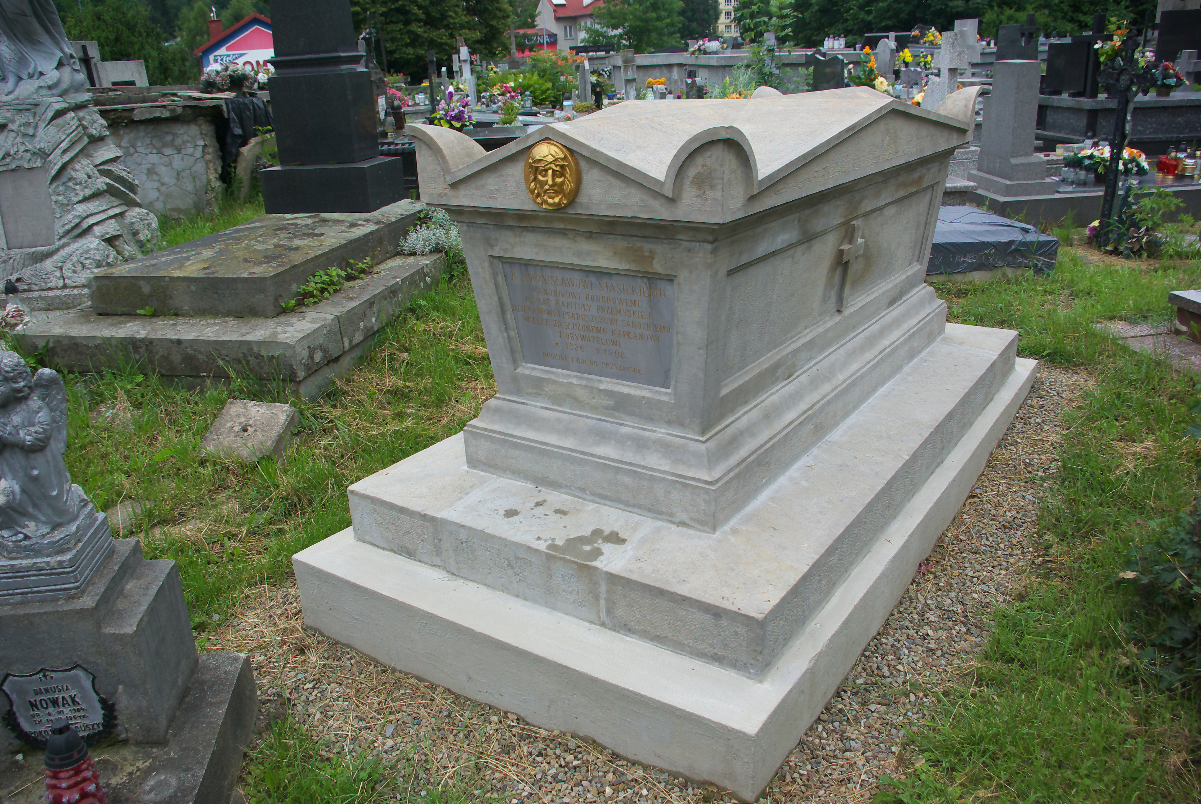 Nagrobek-sarkofag ks. Bronisława Stasickiego na Cmentarzu Centralnym w Sanoku po odnowieniu w 2020.